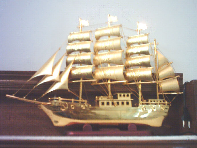 نماذج للمركبات البحرية (منتج الصورة Eng_momo86)